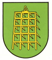 Wappen von Ehweiler